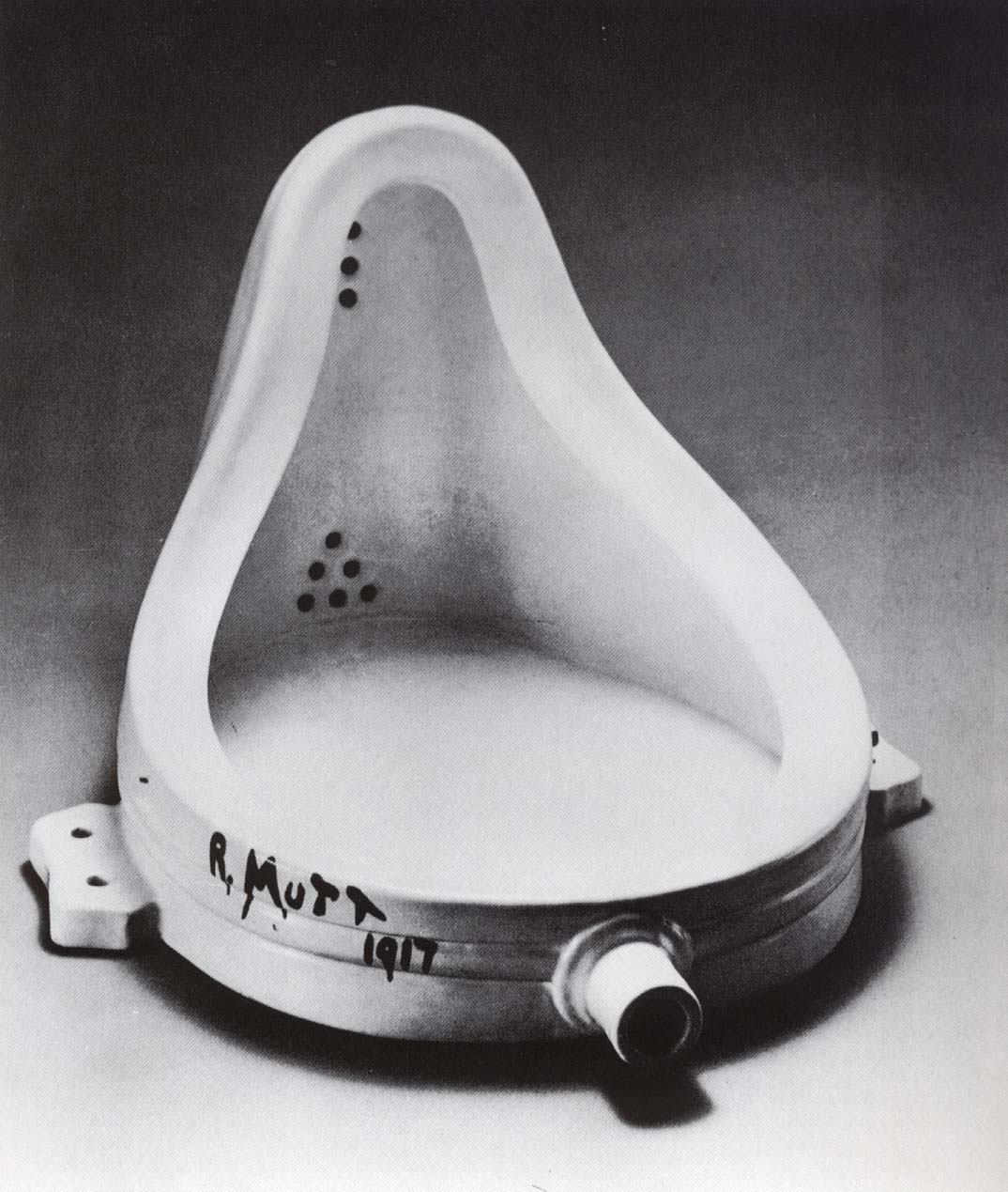 Marcel Duchamp, Fountain, replica